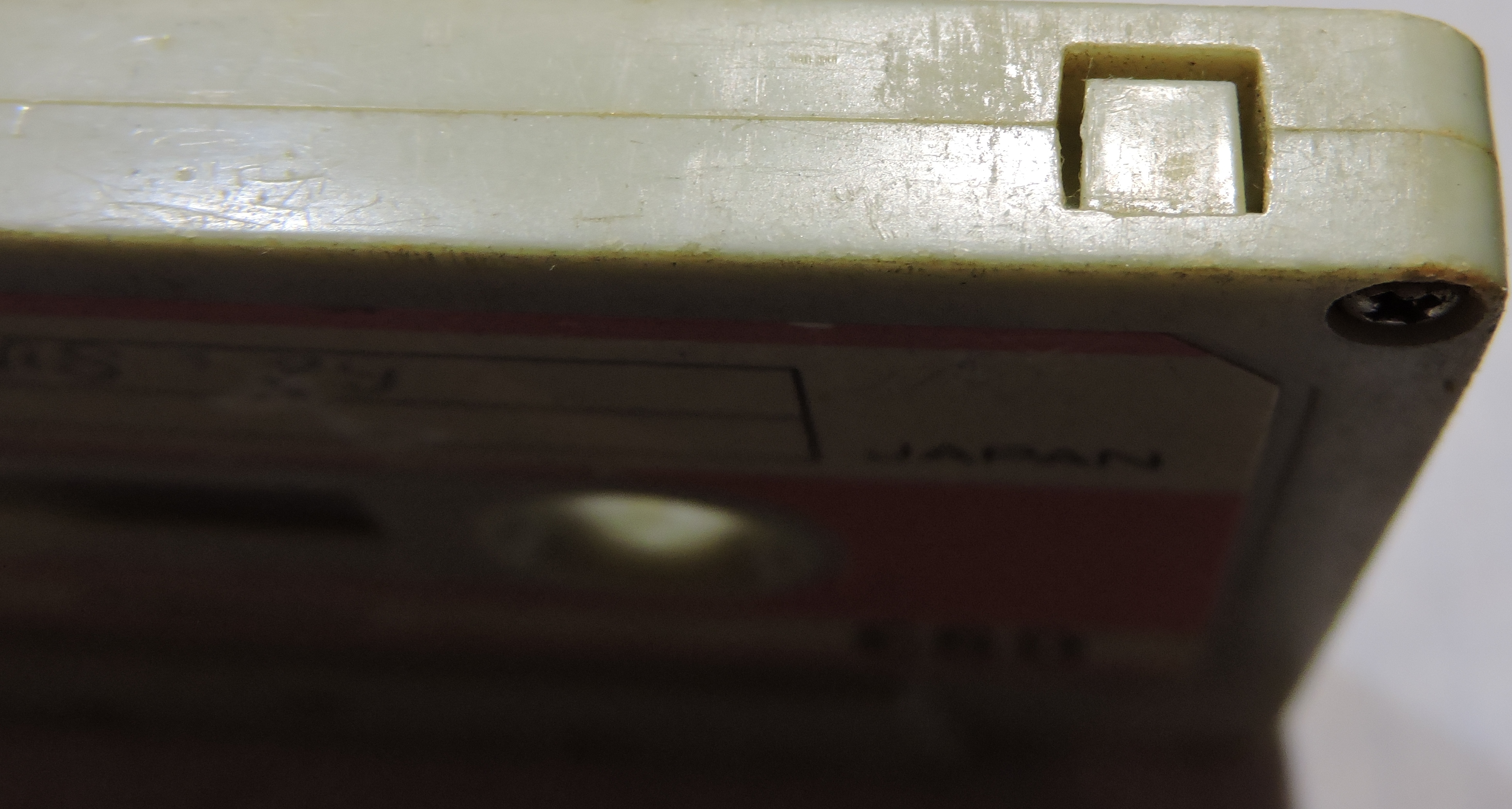 Защитный язычок аудиокассеты предназначен для защиты носителя от перезаписи. Для его задействования его просто выламывают: тогда в полость проваливается рычажок, отвечающий за блокировку кнопки записи. Если же на эту кассету всё же что-то захочется записать - полость можно либо заклеить скотчем, либо забить, например, скомканной бумагой